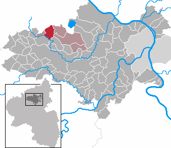 Rieden in Rhineland-Palatinate - district Mayen-Koblenz